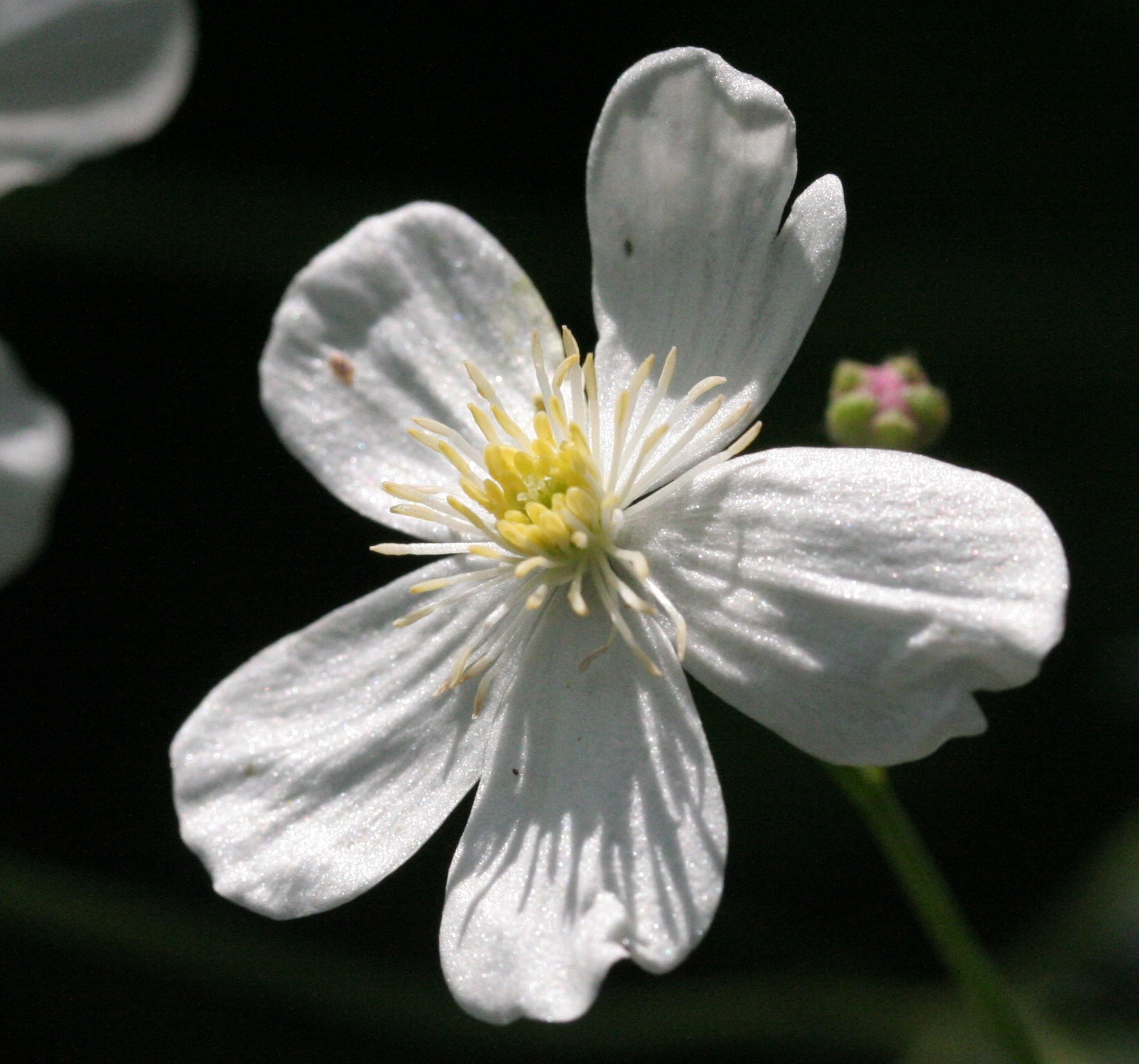 Ranuncolo a foglie di platano - Località: Giardino Botanico Alpino "Giangio Lorenzoni", Pian Cansiglio, Tambre d'Alpago (BL), 1000 m s.l.m.